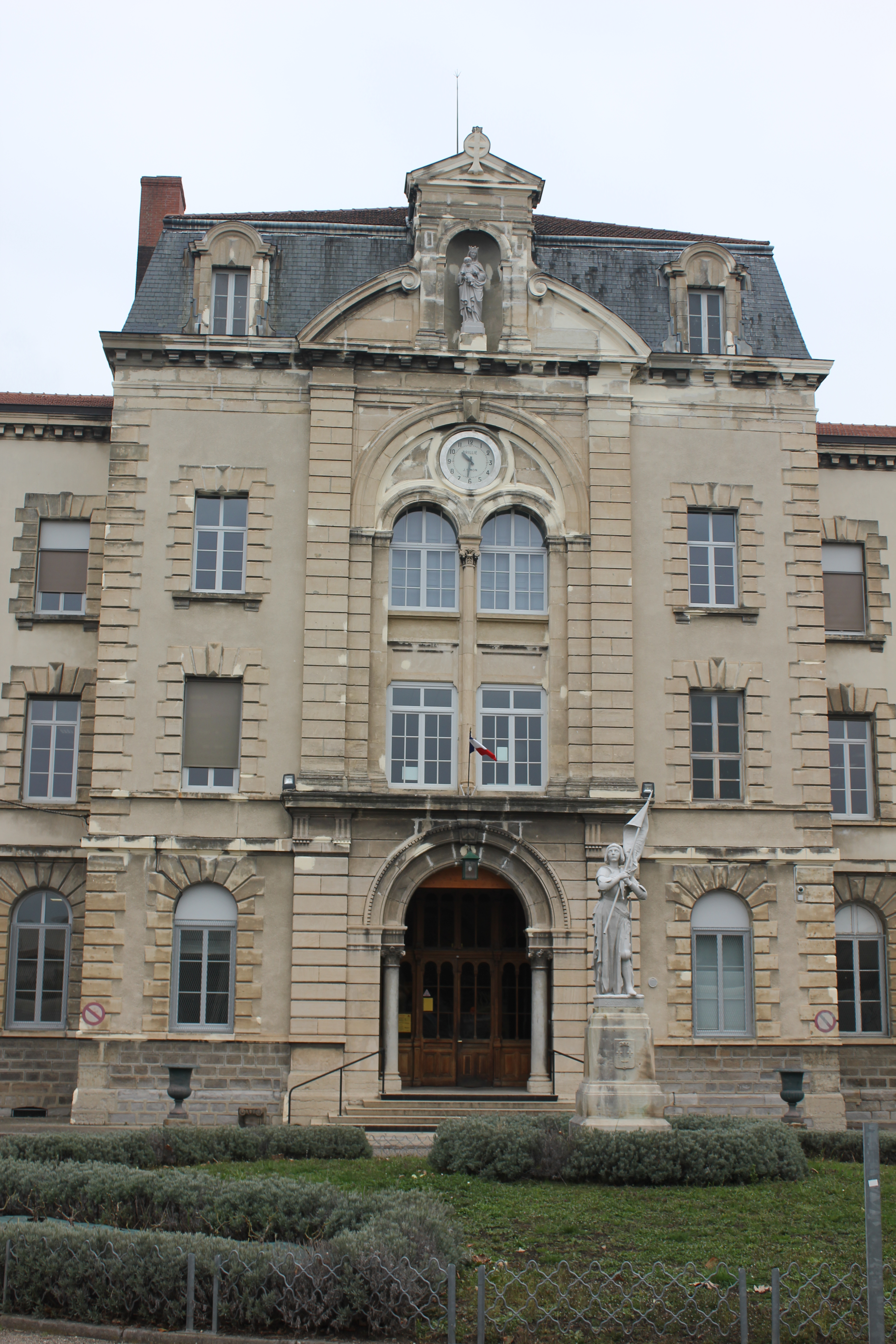 entrée du bâtiment principal de l’institution Sainte Marie la grand'grange (ISMGG). 15 route du coin à Saint Chamond.